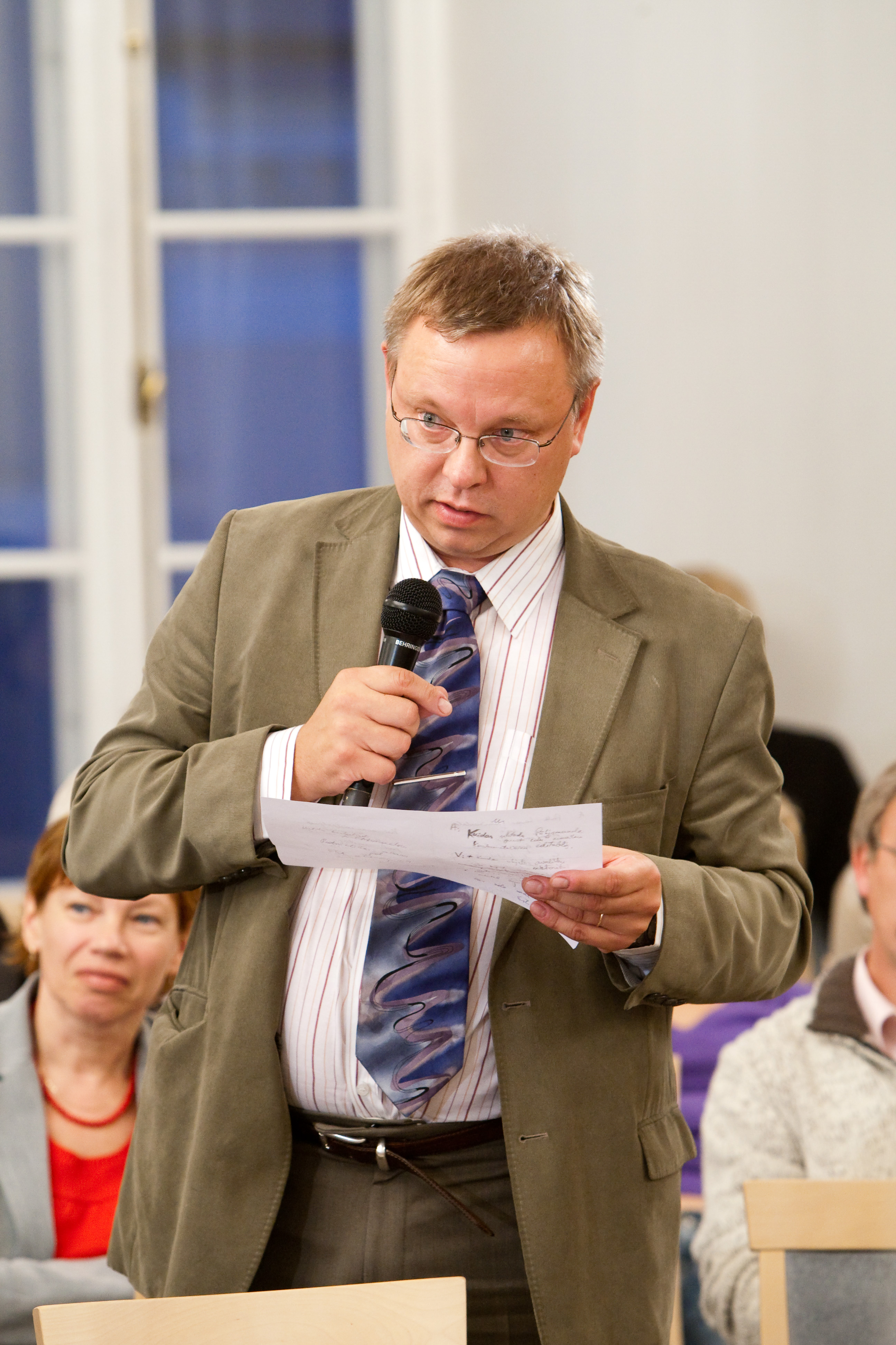 Avalik arvamusliidrite debatt "Riik ja majandus" TÜ aulas, mis oli ühtlasi ka avalöögiks rahvusülikooli juubelile pühendatud väitlusturniirile. Debatis osalesid TÜ makroökonoomika dotsent Viktor Trasberg ja Mainori Kõrgkooli Ärijuhtimise Instituudi direktor Andres Arrak, moderaator Kajar Kase Tartu Üliõpilaste Väitlusklubist. Pildil TÜ majandusteaduskonna professor Raul Eamets.